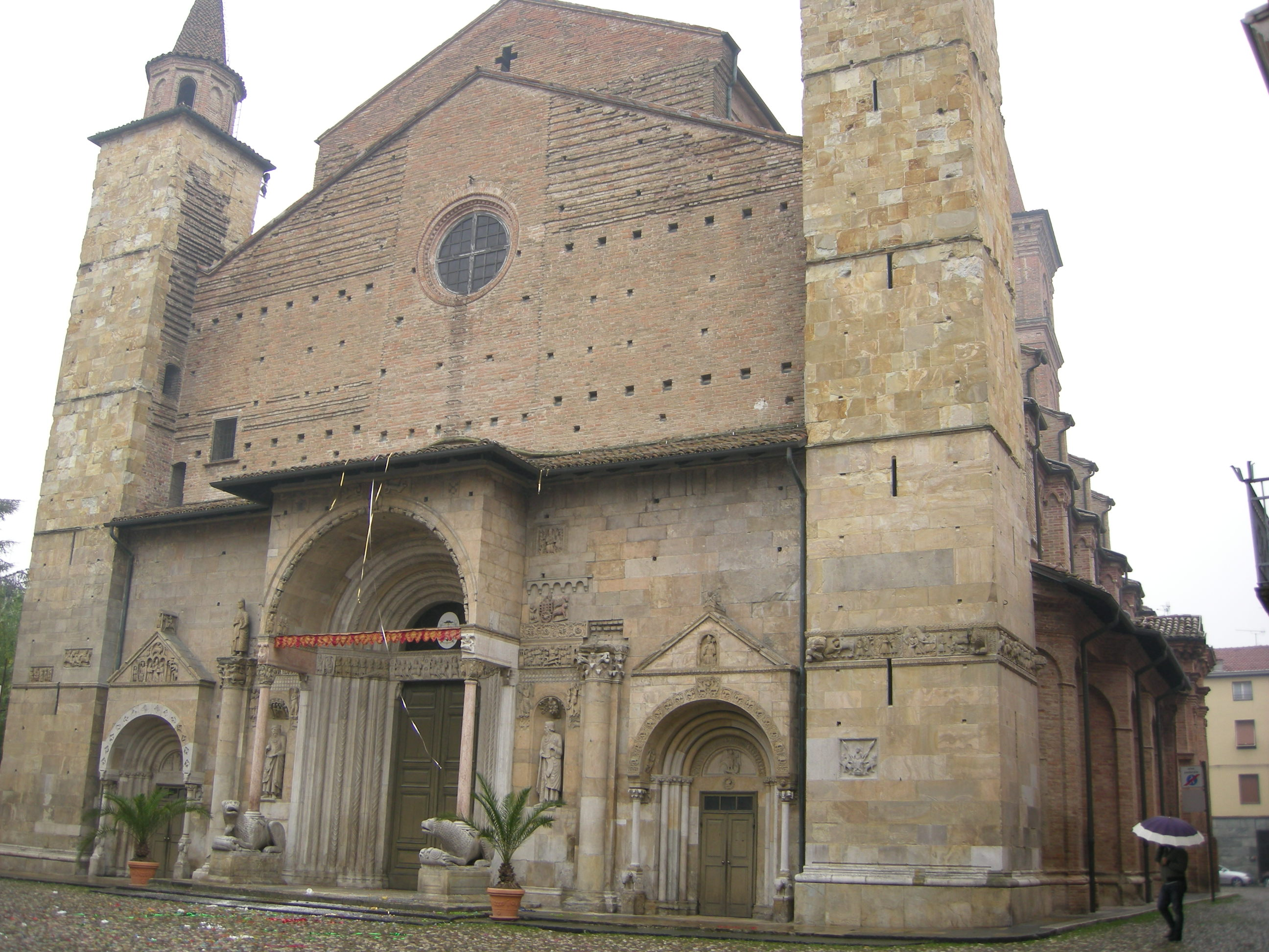 Duomo di fidenza, esterno